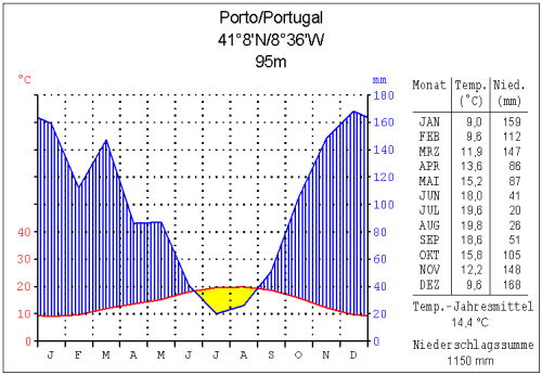 Klimadiagramm von Porto